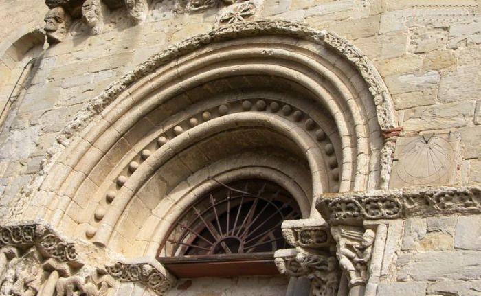 eglise notre dame de cadalen-portail